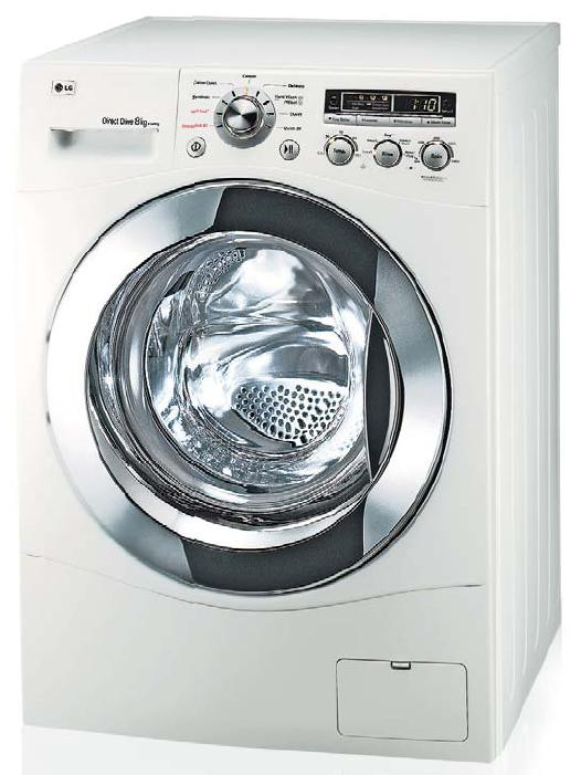 유럽향 드럼세탁기 (모델명_F1047TD)